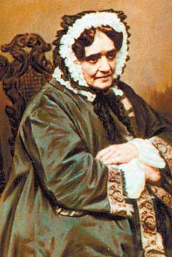 Софья Станиславовна Потоцкая. ур.Киселева (1801-1875)